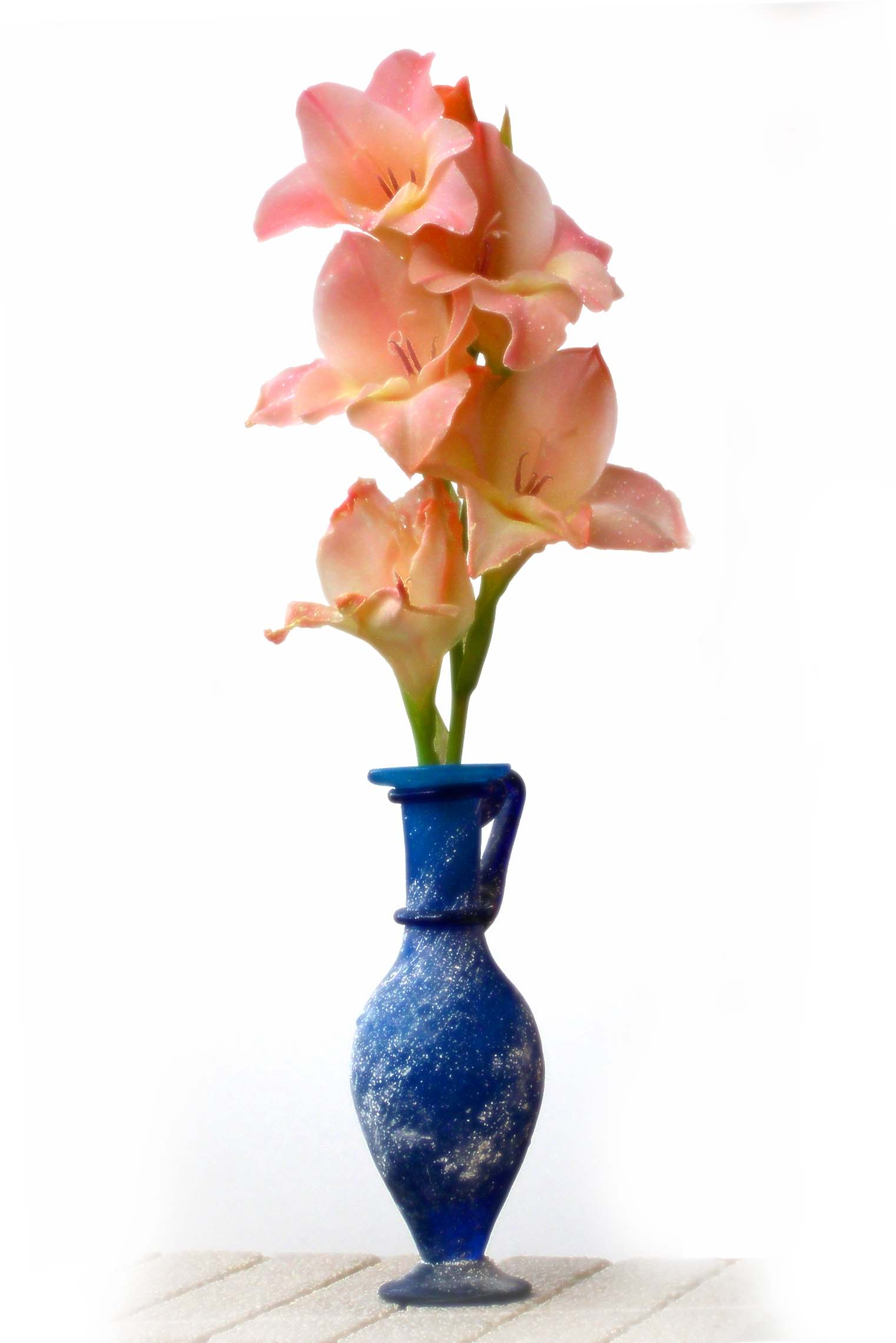 Jarrón de Gladiolos